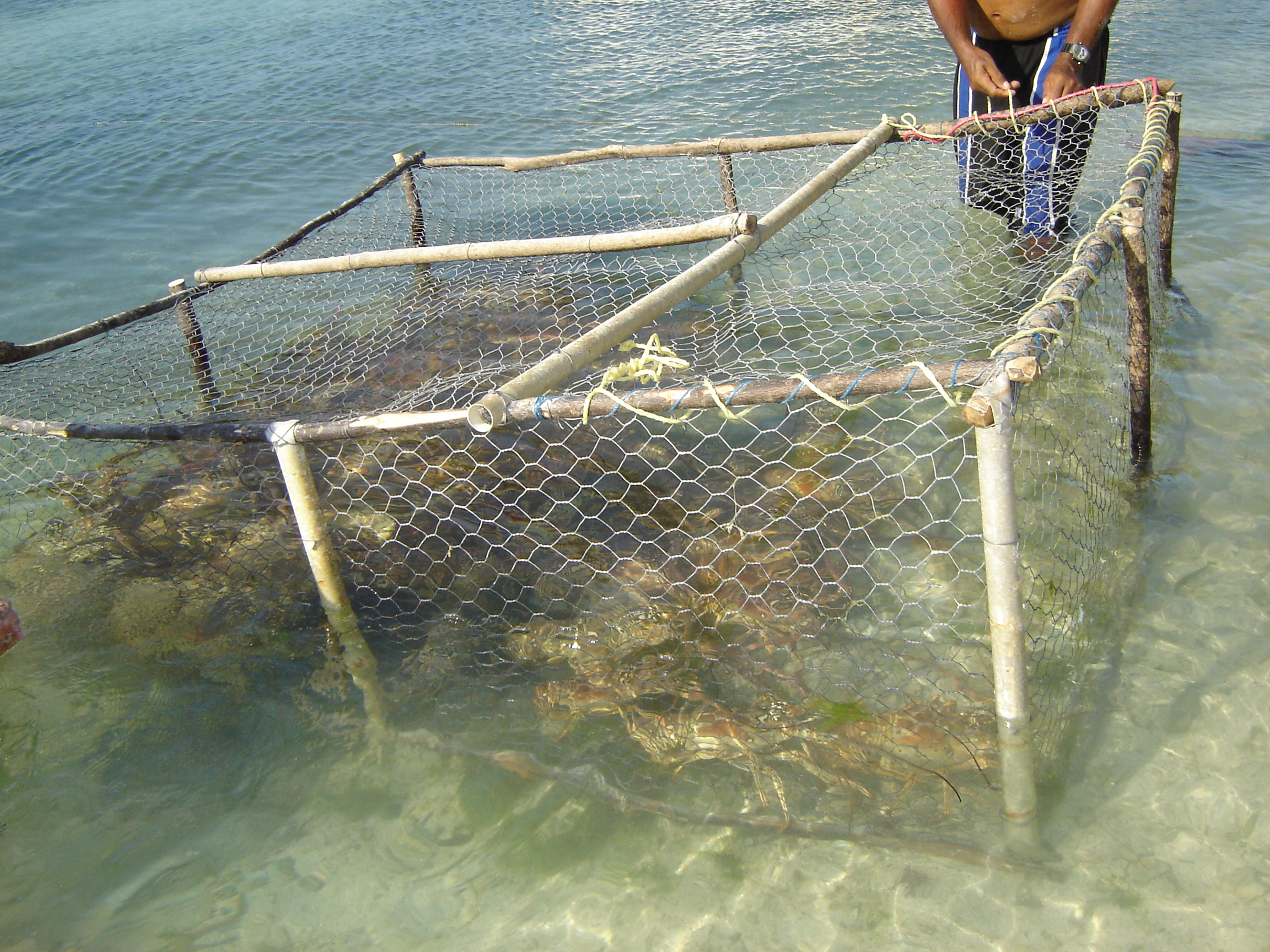 Pesca de Langostas con Nasa en el Archipielago de Los Roques, Venezuela